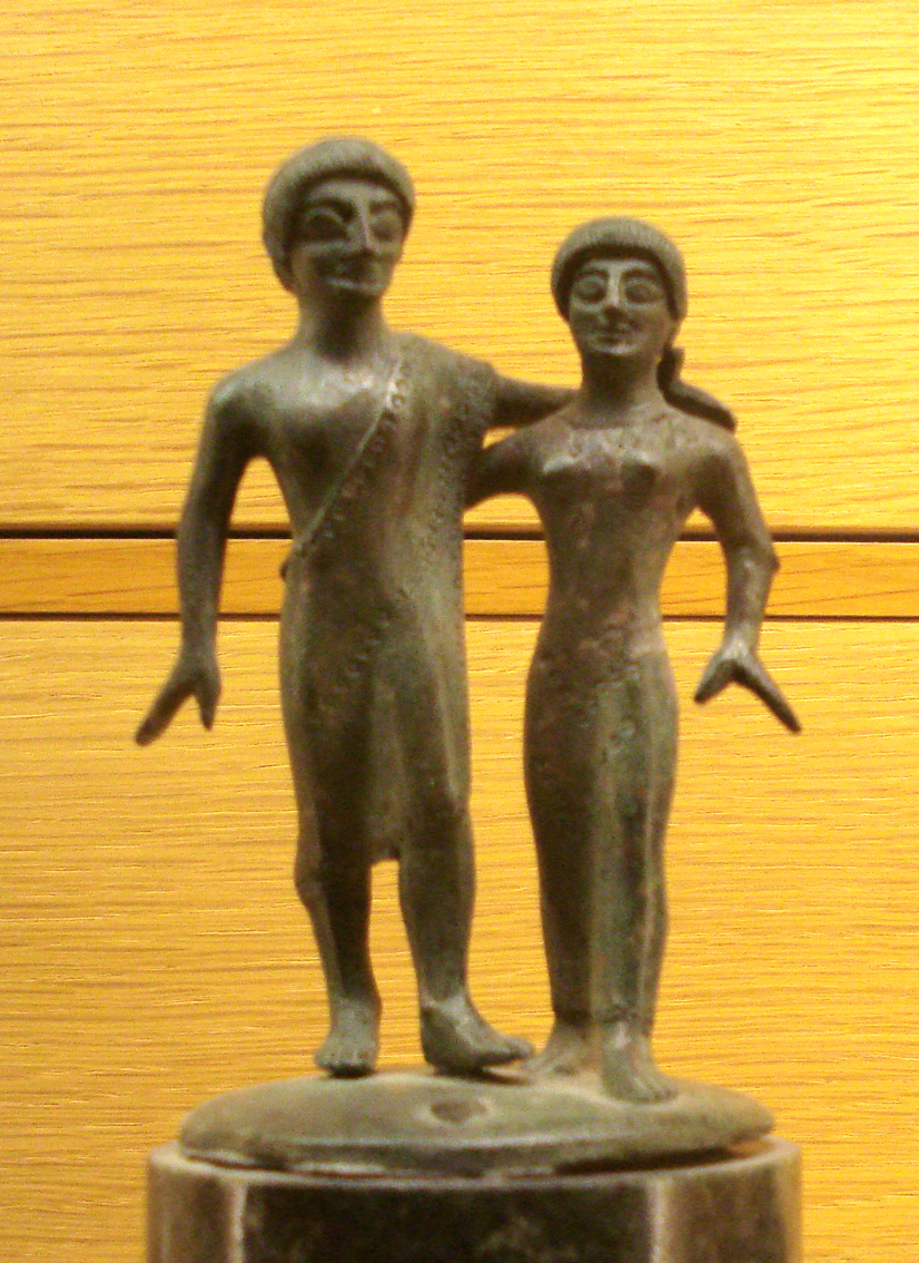 Casal etrusco, bronze, fim do século VI aC